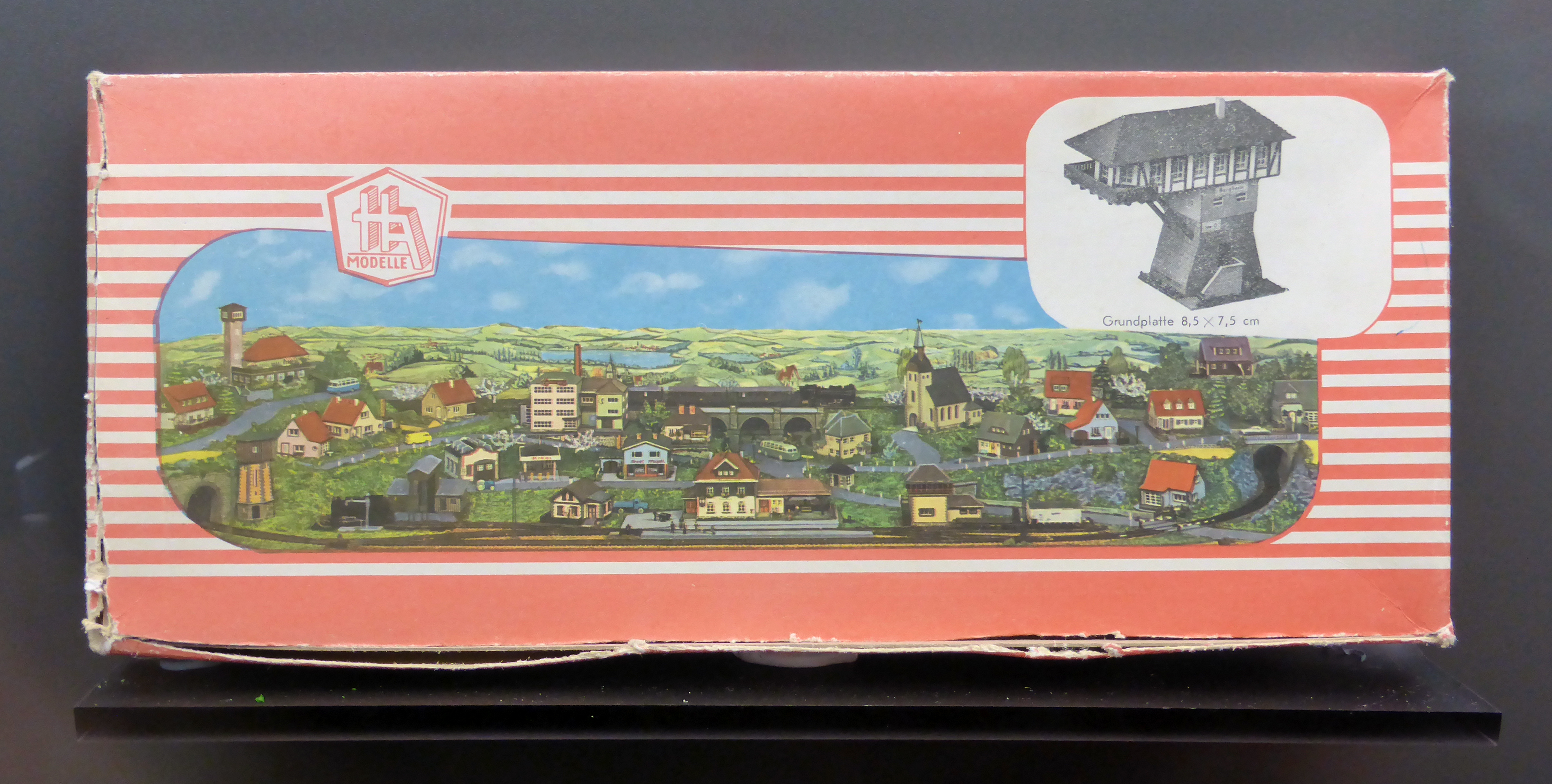 Auhagen-Verpackung: Stellwerk Hasselbach um 1960. Ausgestellt im Museum sächsisch-böhmisches Erzgebirge in Marienberg.